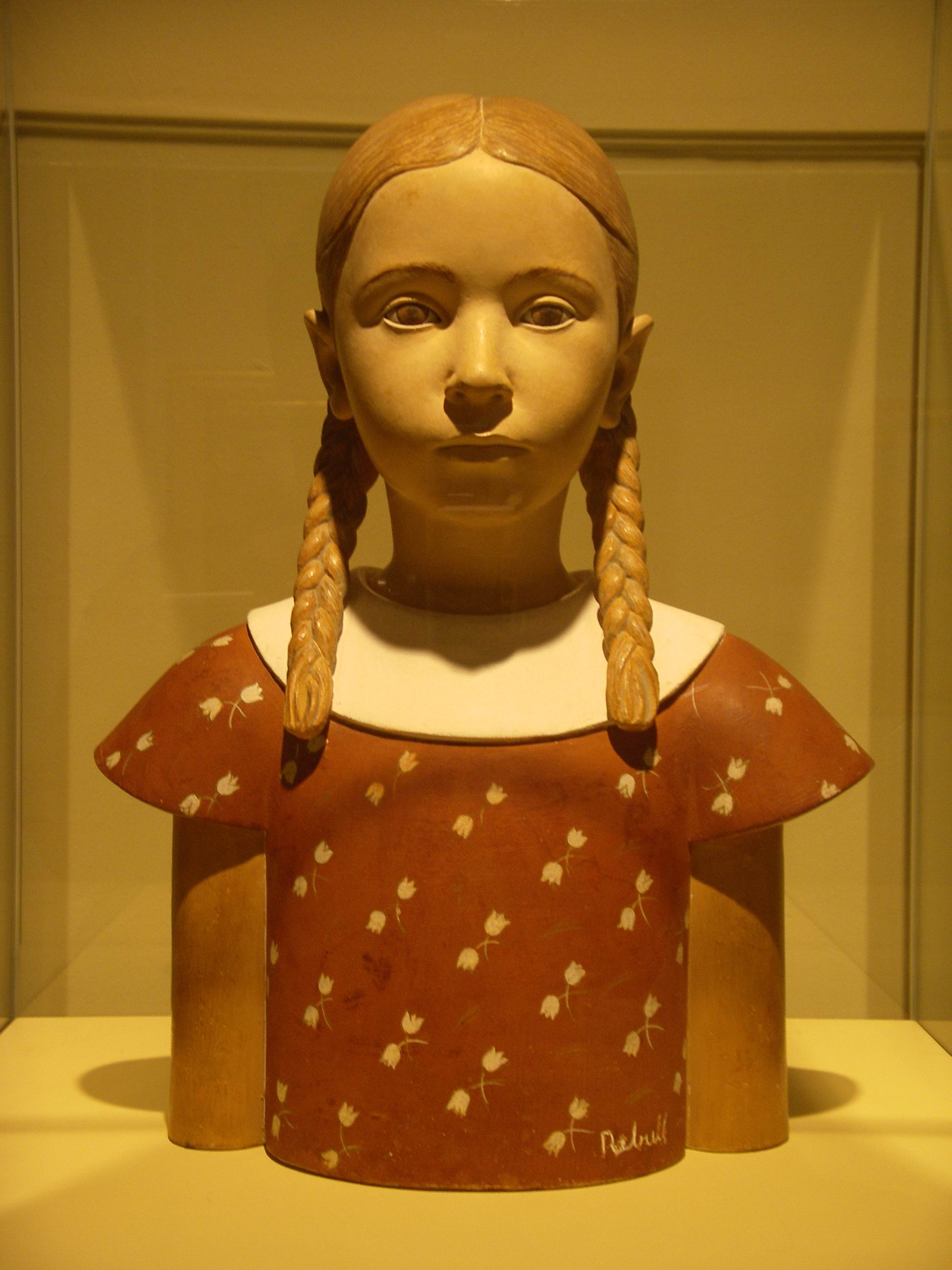 Nena de Joan Rebull, al museu de Montserrat